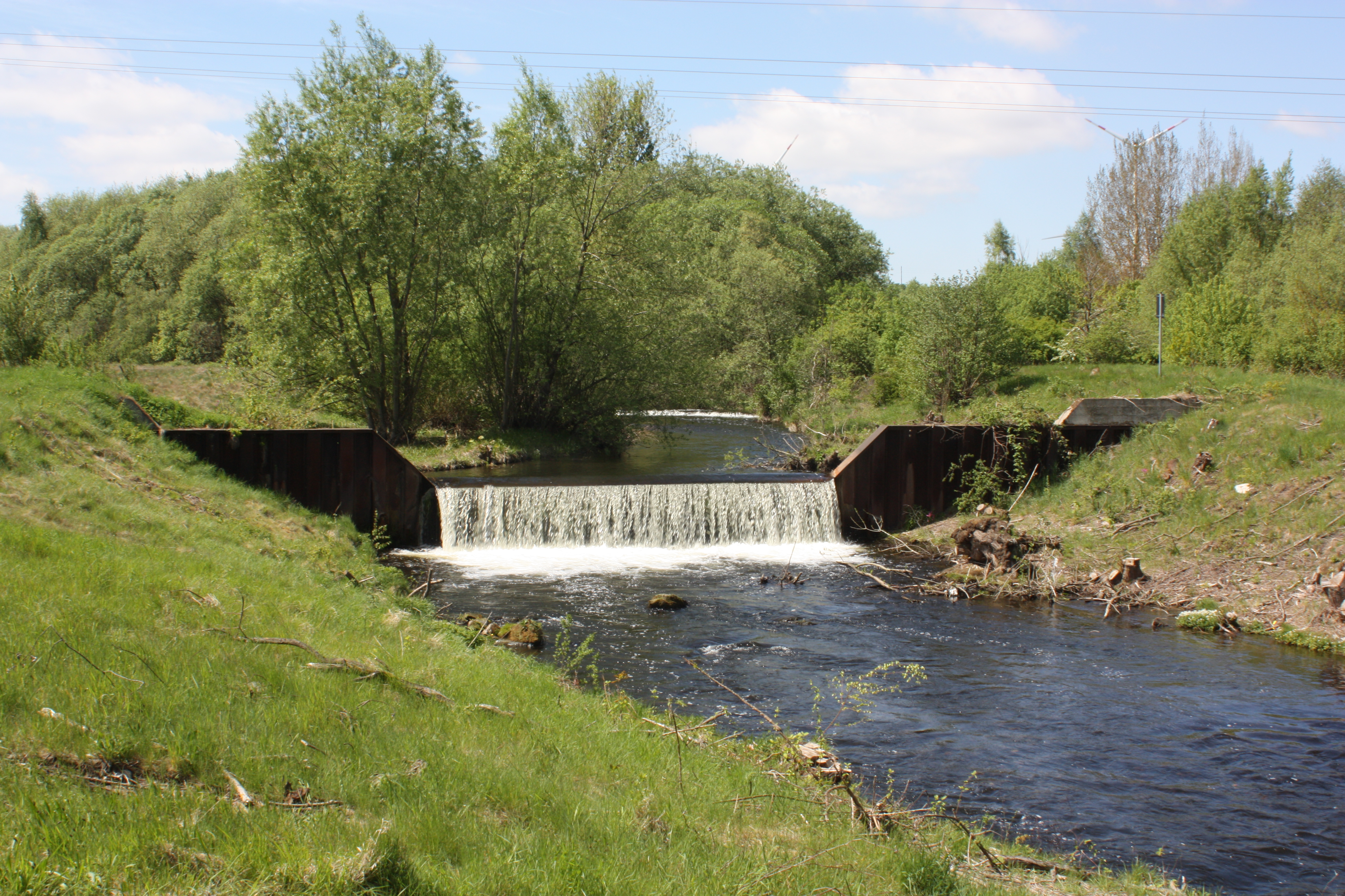 Oker bei Vienenburg